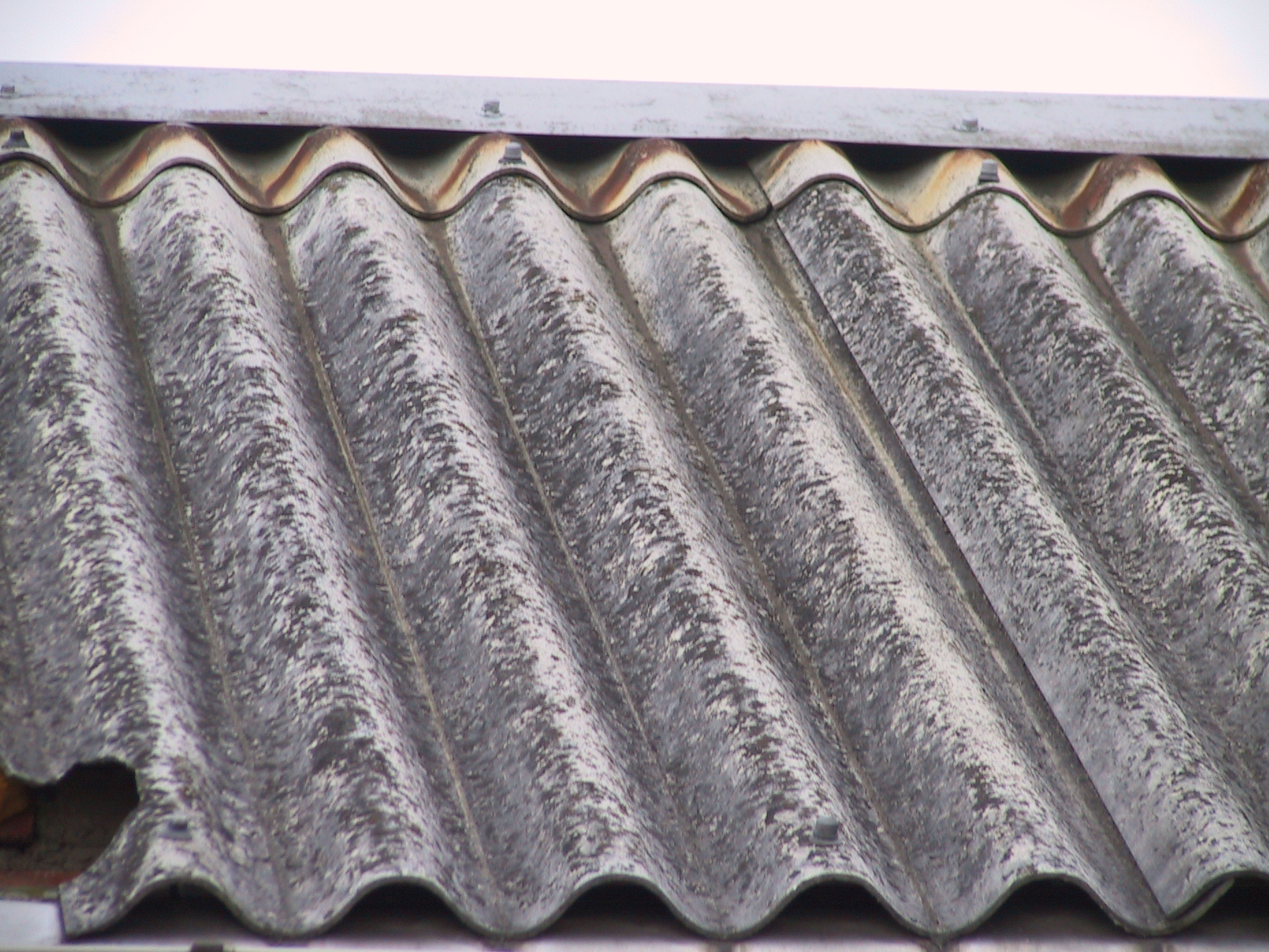 Dach aus Wellasbest, Aufnahme vom 03.07.2005)